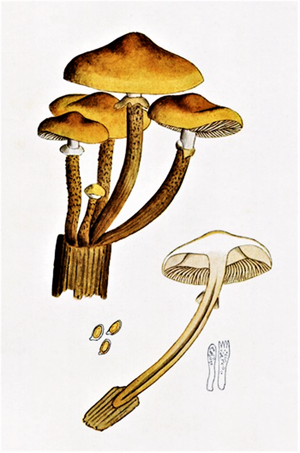 Bres.: Pholiota mutabilis Schaeff., 1774) P.Kumm. (1871), heute Kuehneromyces mutabilis (Schaeff.) Singer & A.H.Sm. (1946)